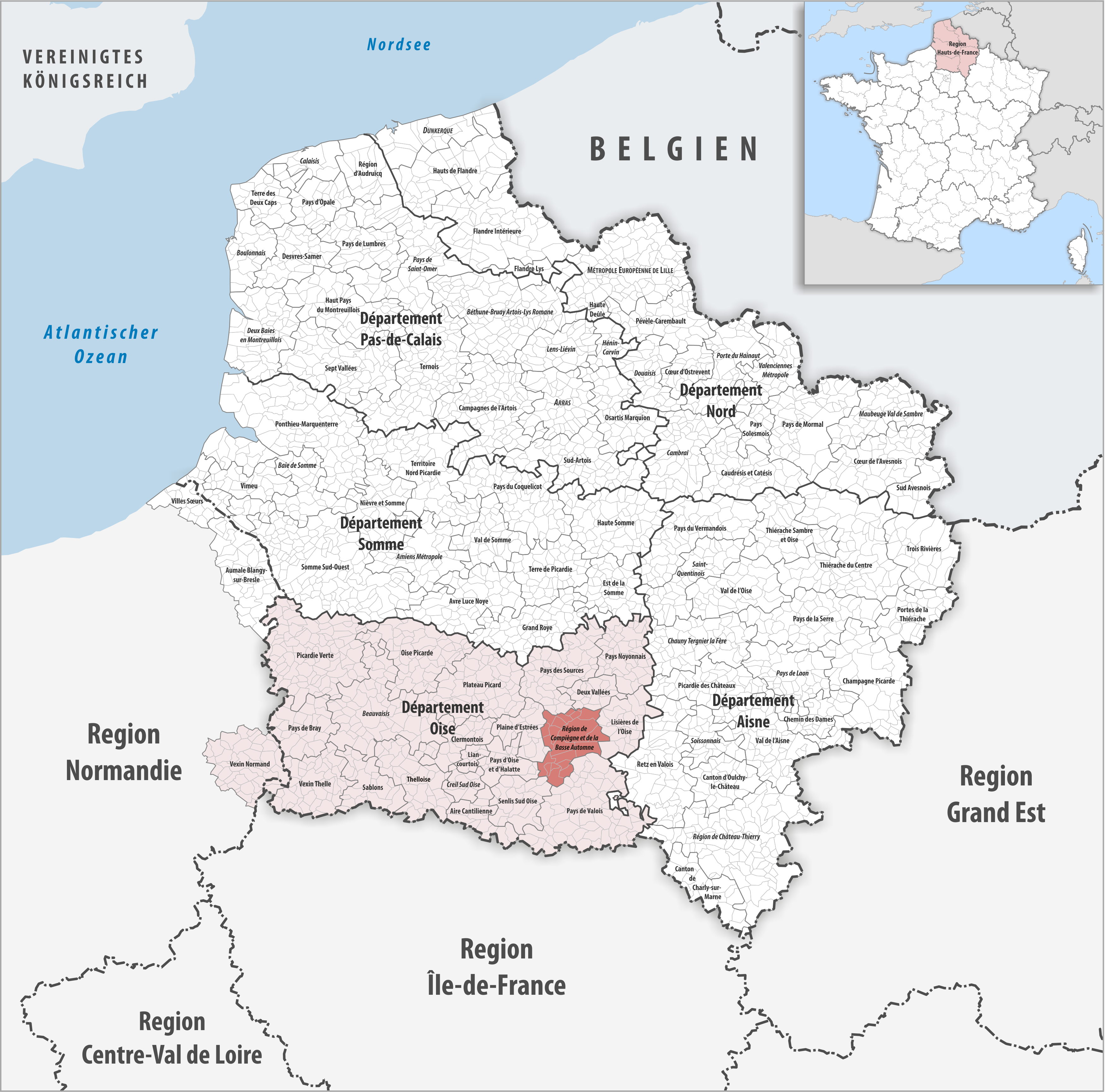 Lage des Gemeindeverbandes Région de Compiègne et de la Basse Automne